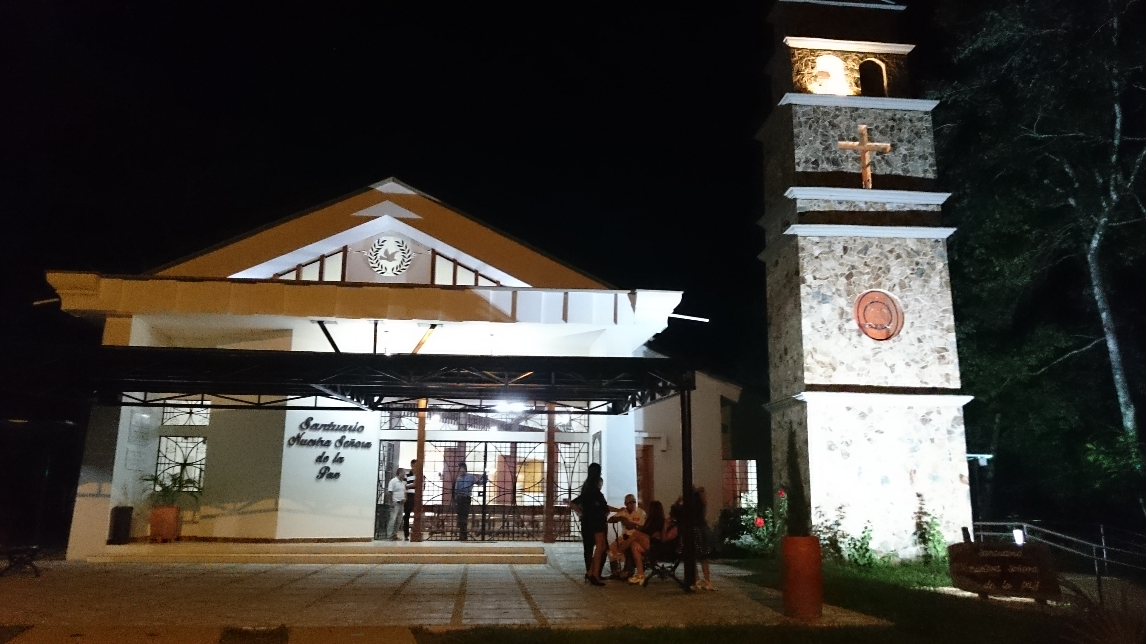 Santuario Nuestra Señora de la Paz, Seminario Mayor Nuestra Señora de la Anunciación. Cartago, Valle, Colombia.